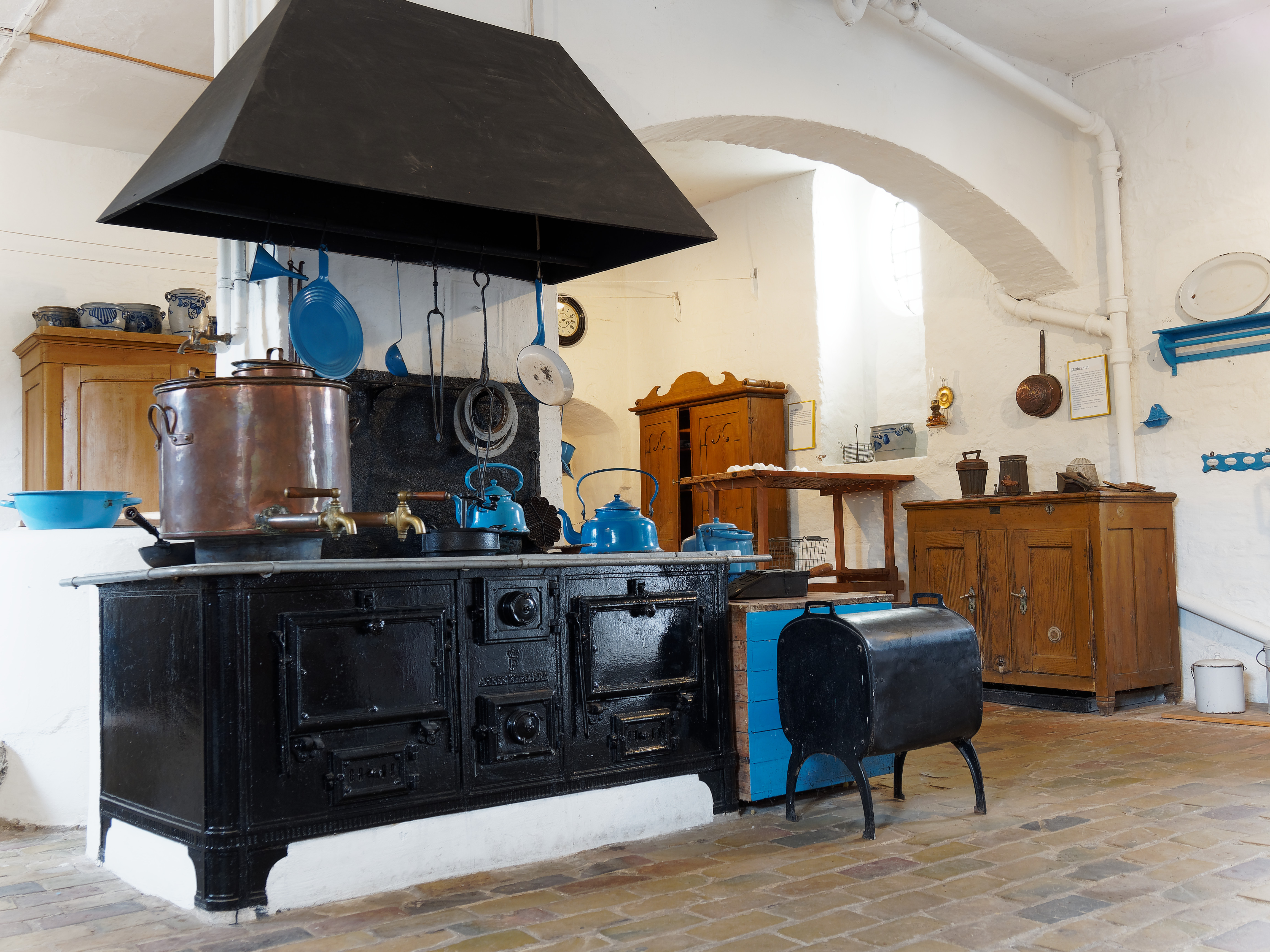 Kloster Börglum, frühere Küche im Hauptgebäude Westseite